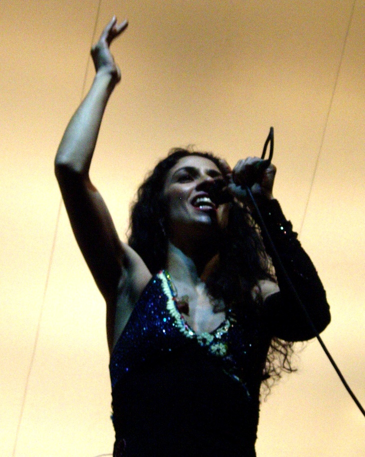 Chevrolet Hall - BH - Brasil - Marisa Monte (14.09.07)